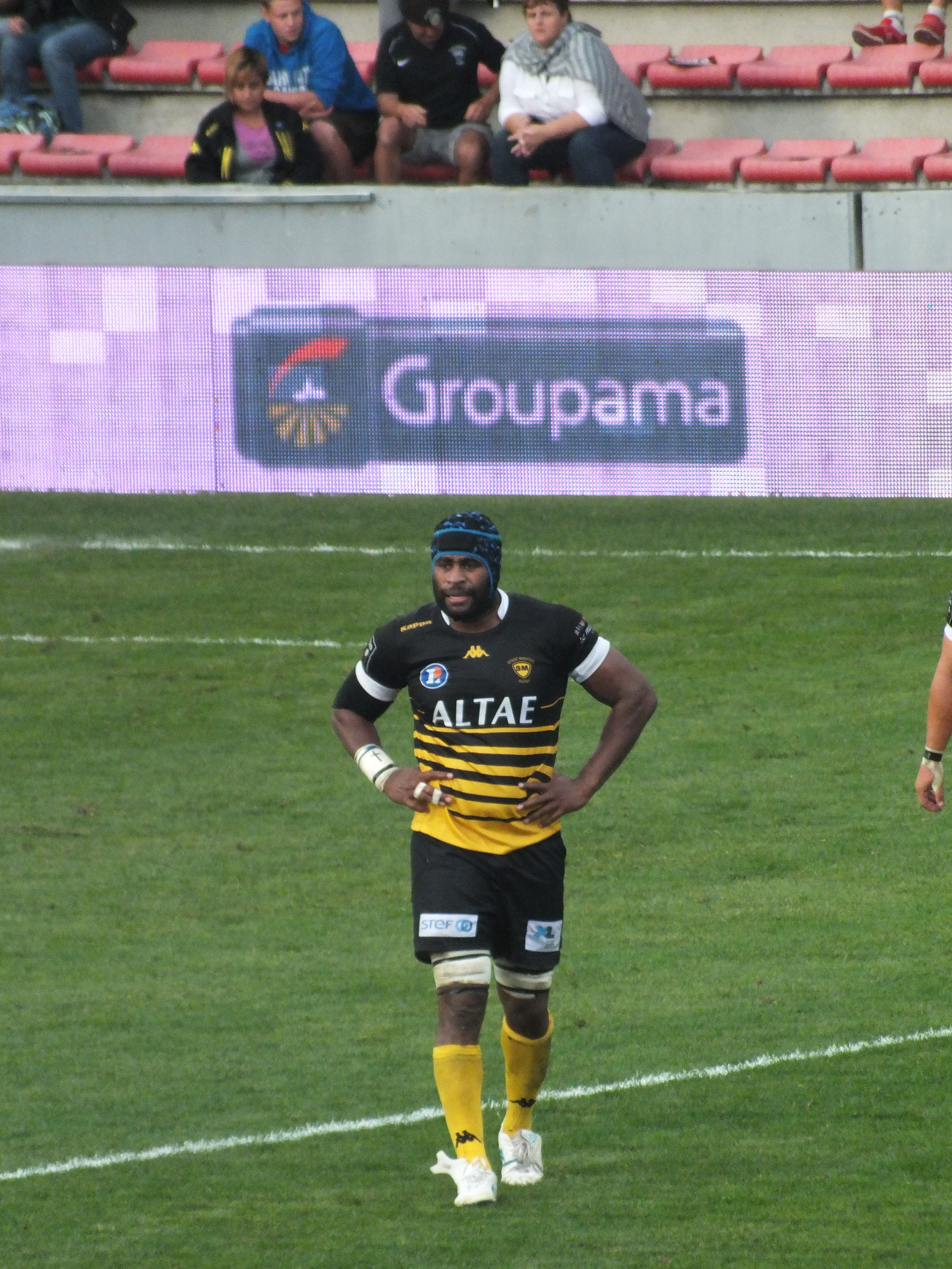 Top 14 — 25 August 2012, Stade Ernest-Wallon. Match between: Stade toulousain — Stade montois